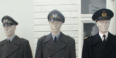 Bundeswehrmuseum Dresden mit Schirmmützen aus den frühen 1960er Jahren